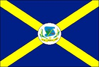 Bandeira do município goiano Edéia